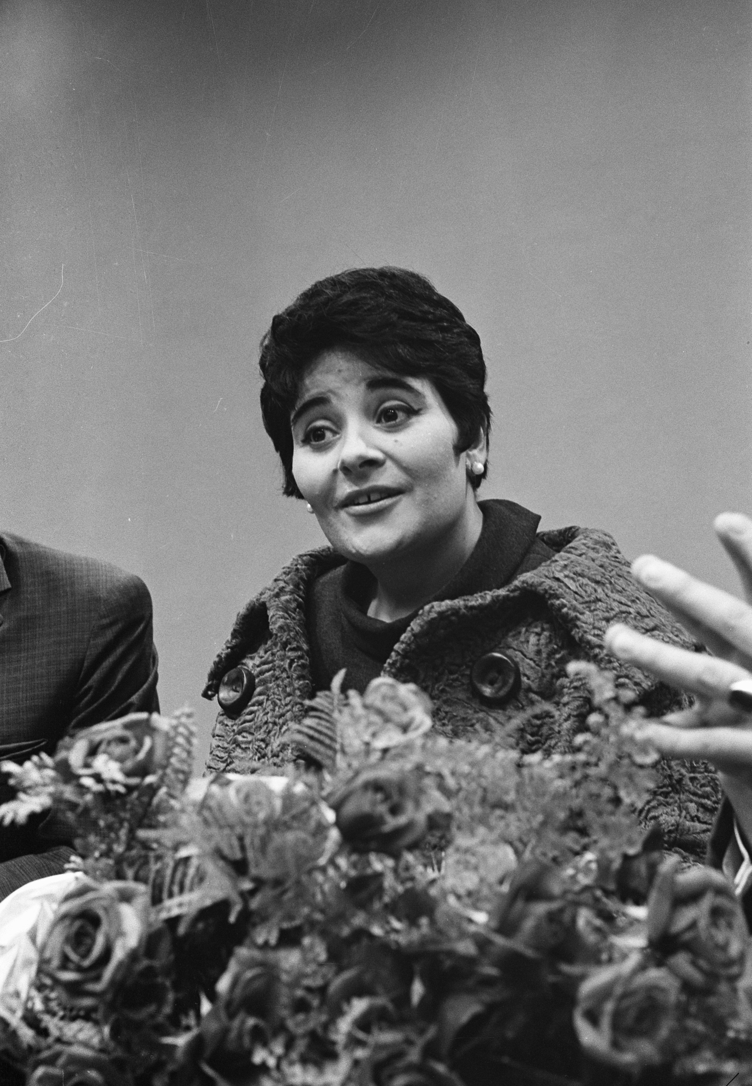 Collectie / Archief : Fotocollectie Anefo Reportage / Serie : [ onbekend ] Beschrijving : Aankomst Victoria de Los Angelos op Schiphol. Victoria de Los Angelos Datum : 2 oktober 1963 Locatie : Noord-Holland, Schiphol Trefwoorden : aankomsten Fotograaf : Pot, Harry / Anefo Auteursrechthebbende : Nationaal Archief Materiaalsoort : Negatief (zwart/wit) Nummer archiefinventaris : bekijk toegang 2.24.01.05 Bestanddeelnummer : 915-5912